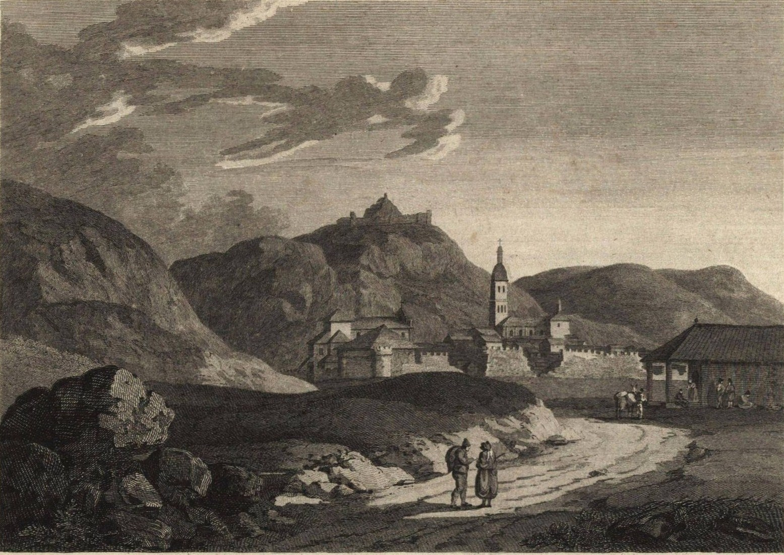 Grabado de Dueñas (1808) de Henry Swinburne en su libro Travels through Spain in the years 1775 and 1776.